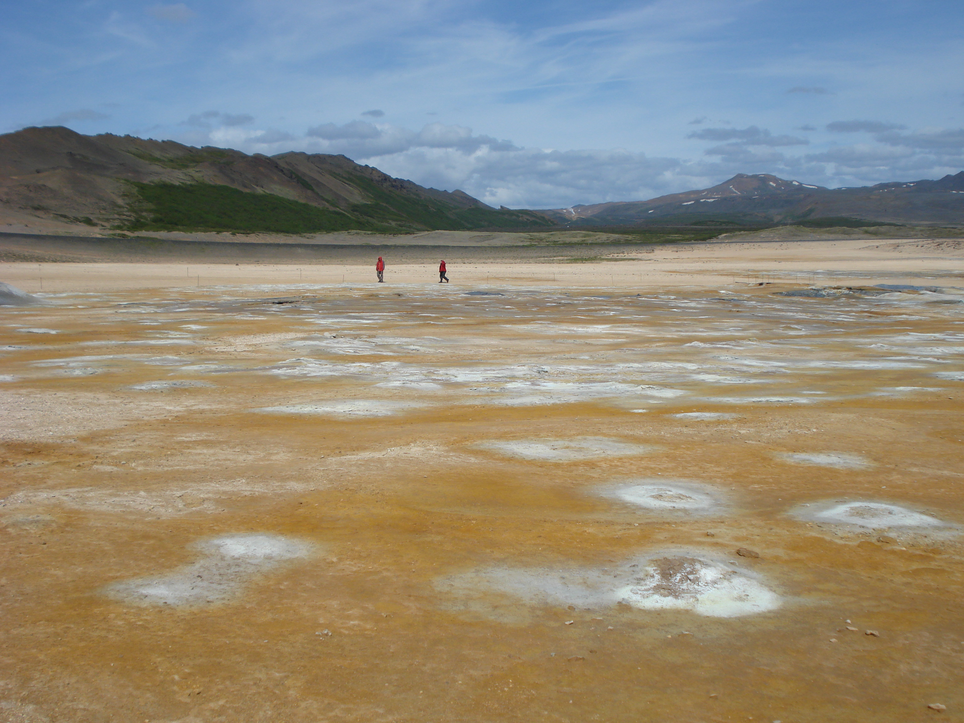 Námafell, Iceland